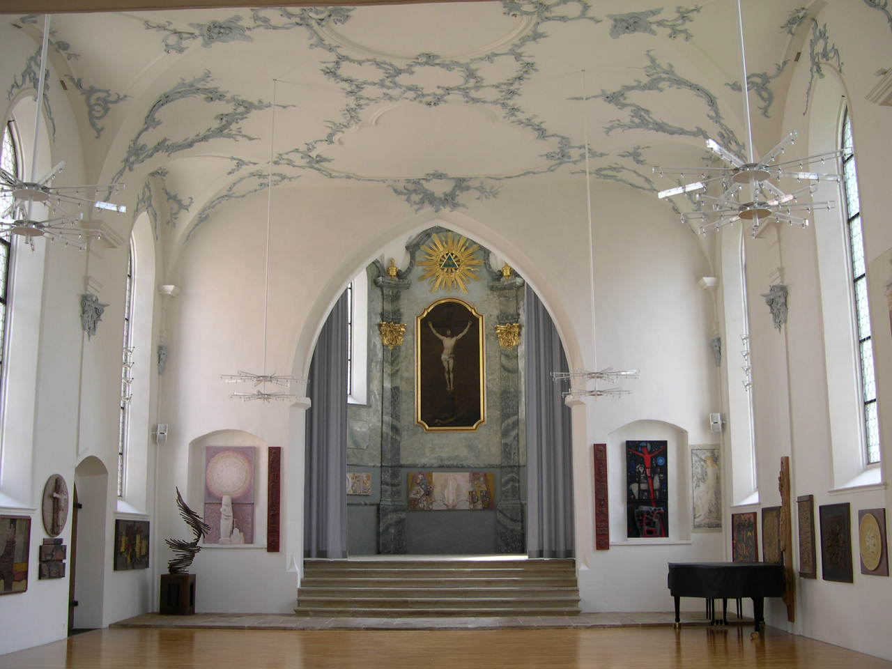 Innenraum der Oberen Kirche, ehemalige Pfarrkirche St.Marien.